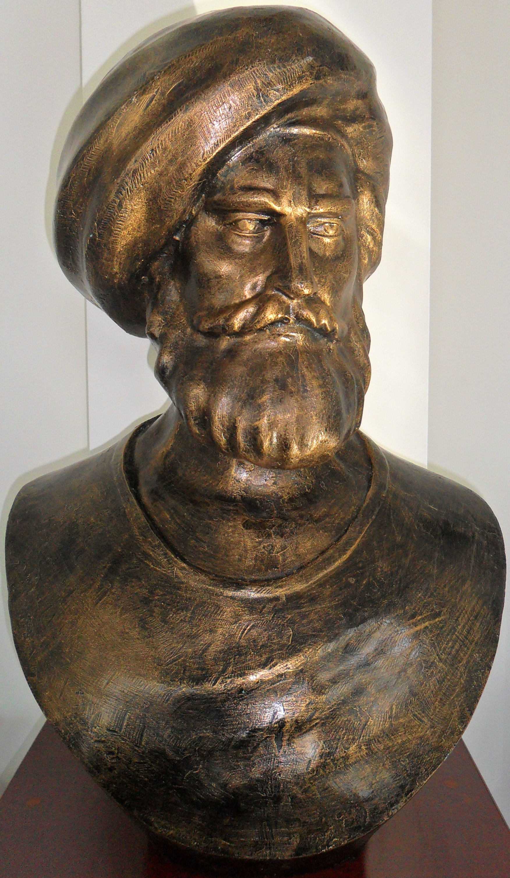 Mersin Deniz Müzesinde bulunan Turgut Reis büstü.